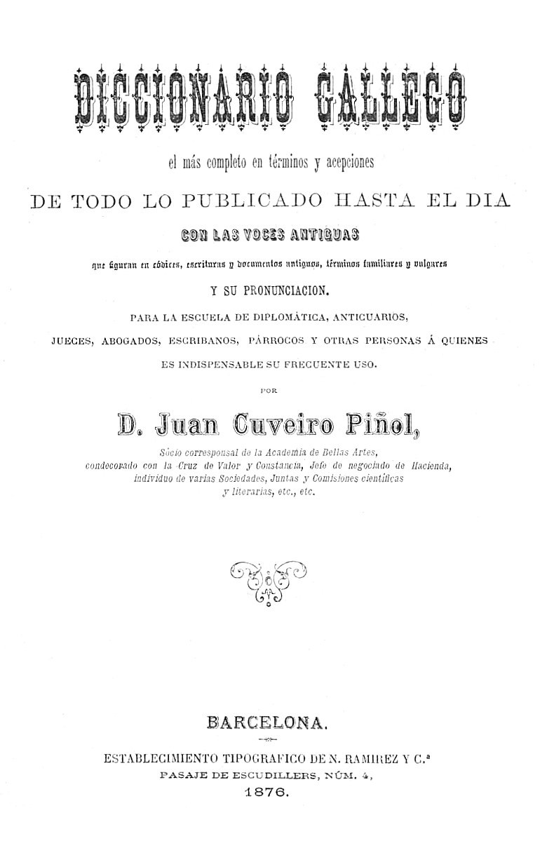 Diccionario gallego, el más completo en términos y acepciones de todo lo publicado hasta el día, con las voces antiguas...